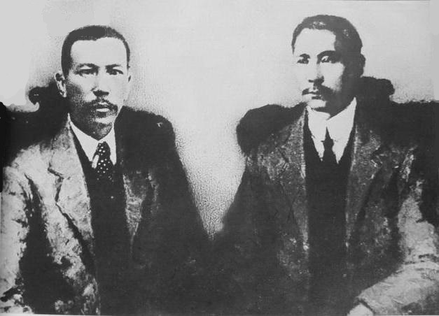 1911年12月16日，孫中山途經新加坡，與陳嘉庚（左）合影. 辛亥革命武昌起義後，1911年11月24日孫中山從法國馬賽啟程，郵輪經新加坡赴上海南北議和，1911年12月16日在新加坡與陳嘉庚合照。12月25日抵上海。